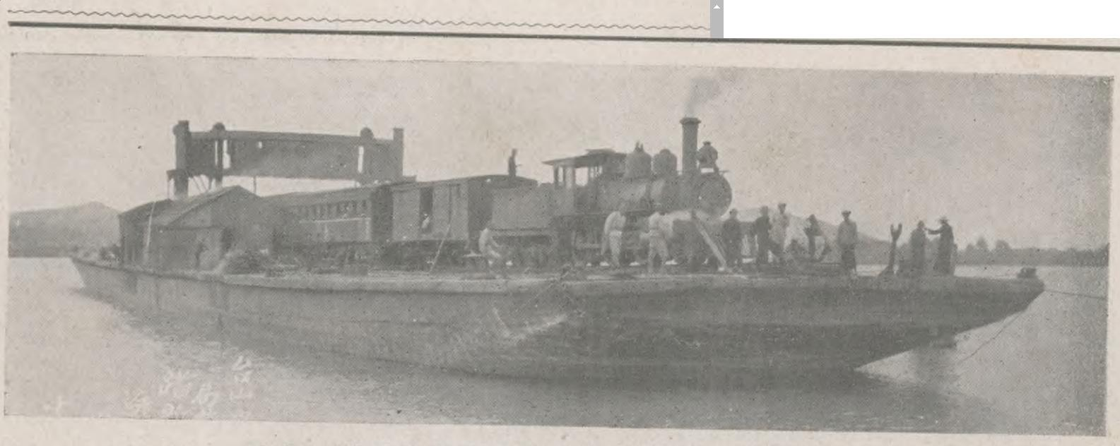 新寧鐵路的火车轮渡